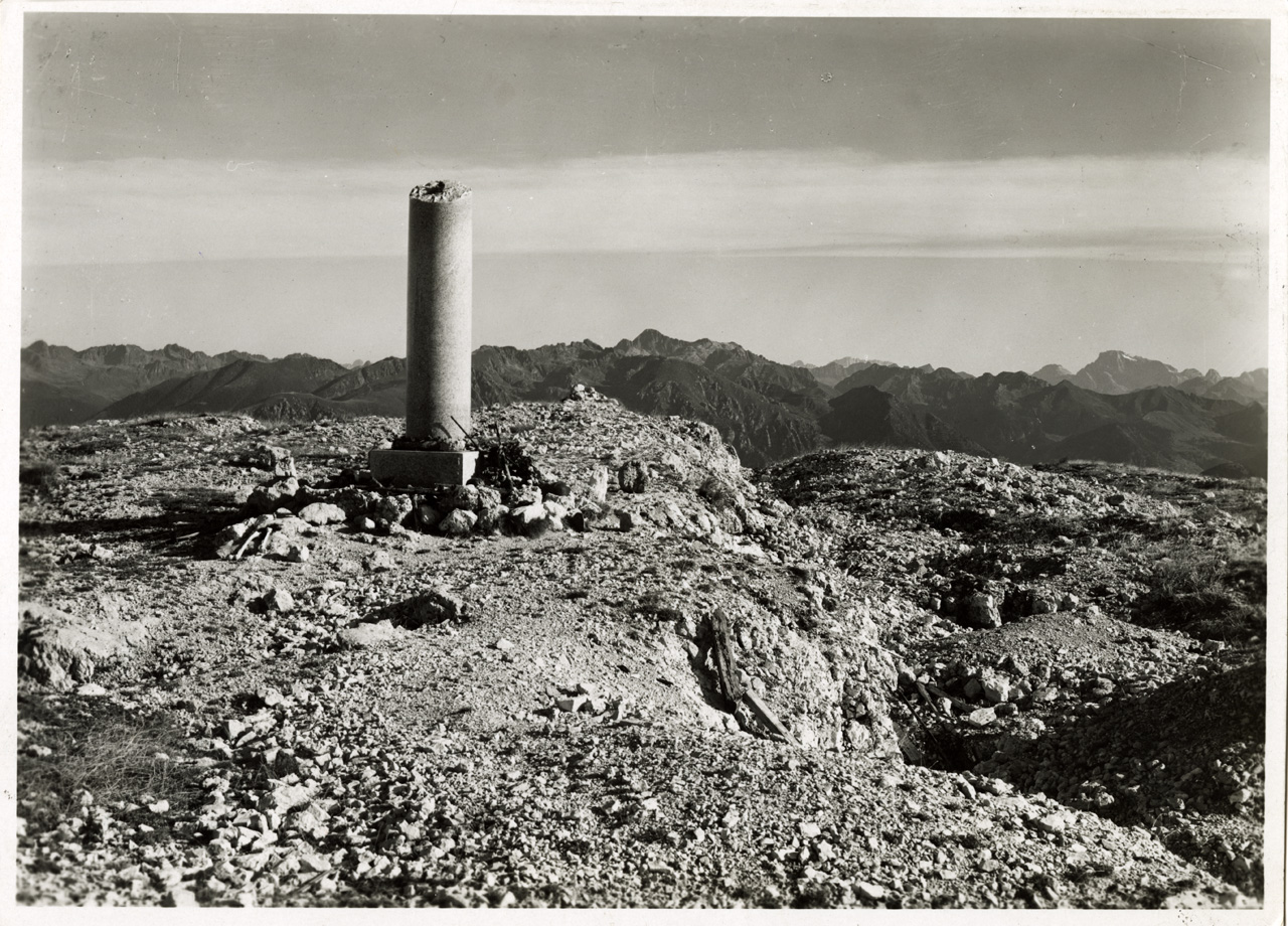 Altopiano di Asiago, Monte Ortigara q. 2101. Cippo ai 20.000 Caduti